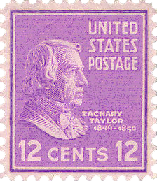 versione tagliata e con sfondo trasparente di File:Zachary taylor stamp.JPG